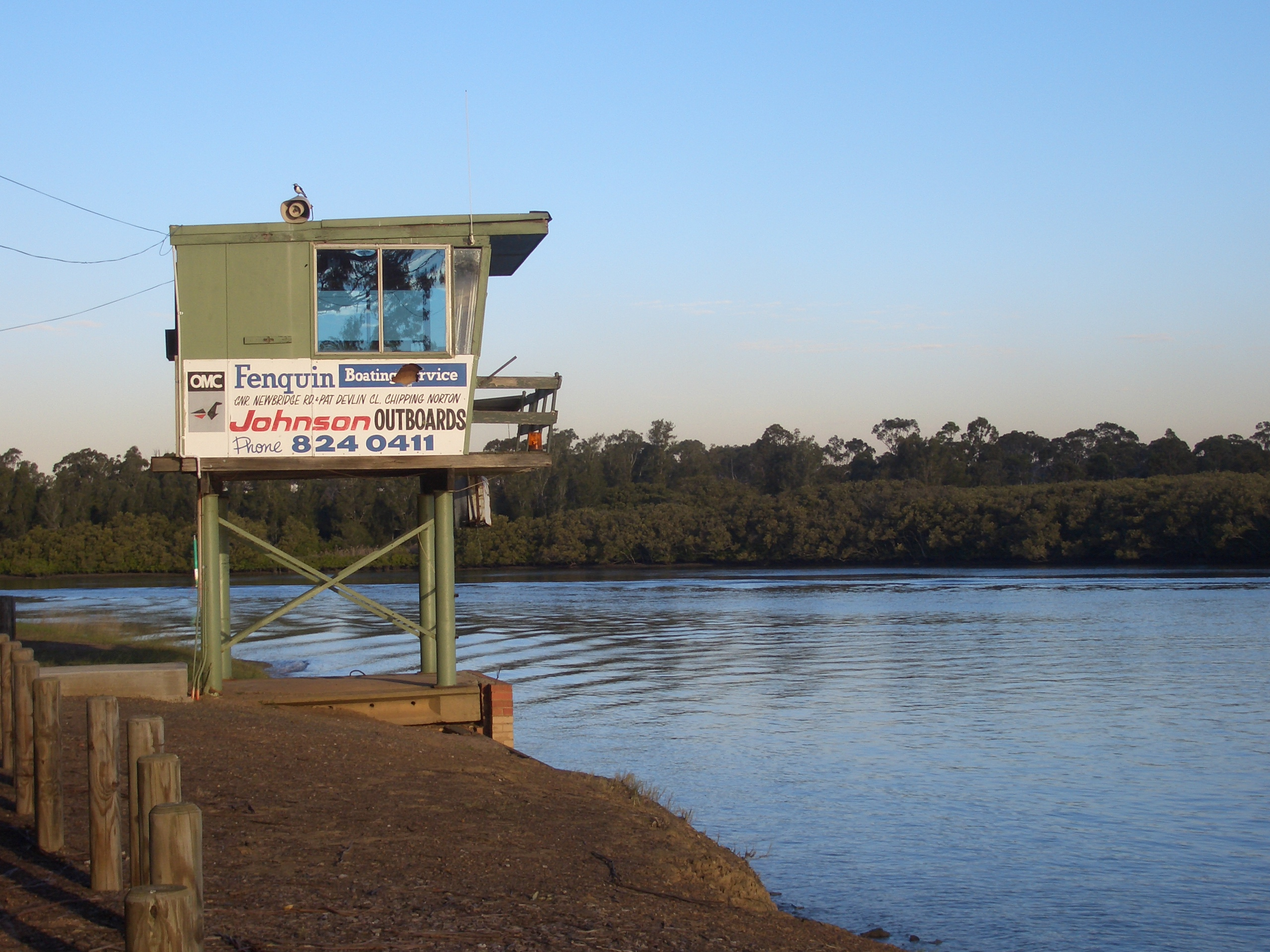 Deepwater Park, Georges River, Milperra